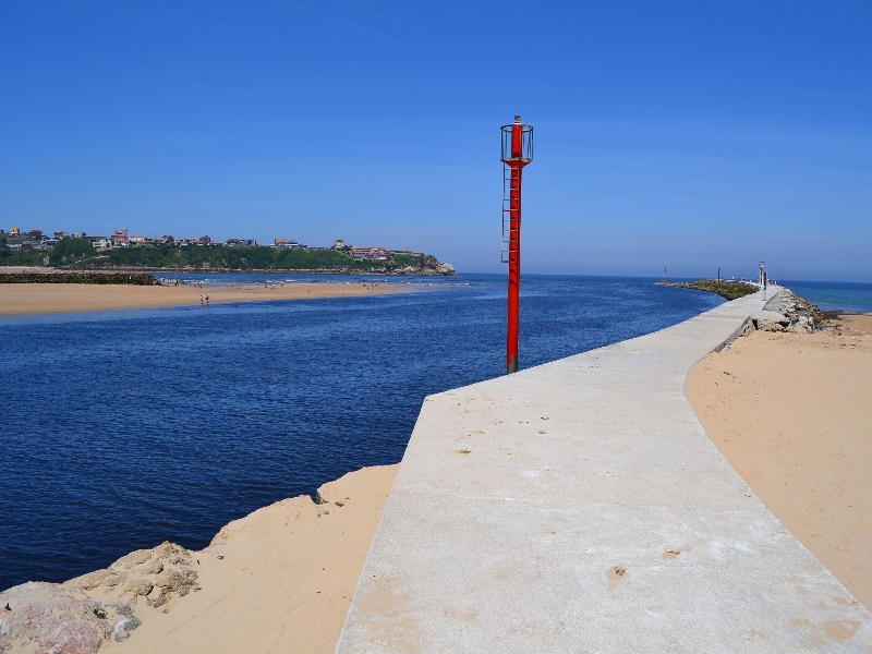 Acceso marítimo ría de Suances (Cantabria) vista desde la playa de CUCHIA (Miengo)